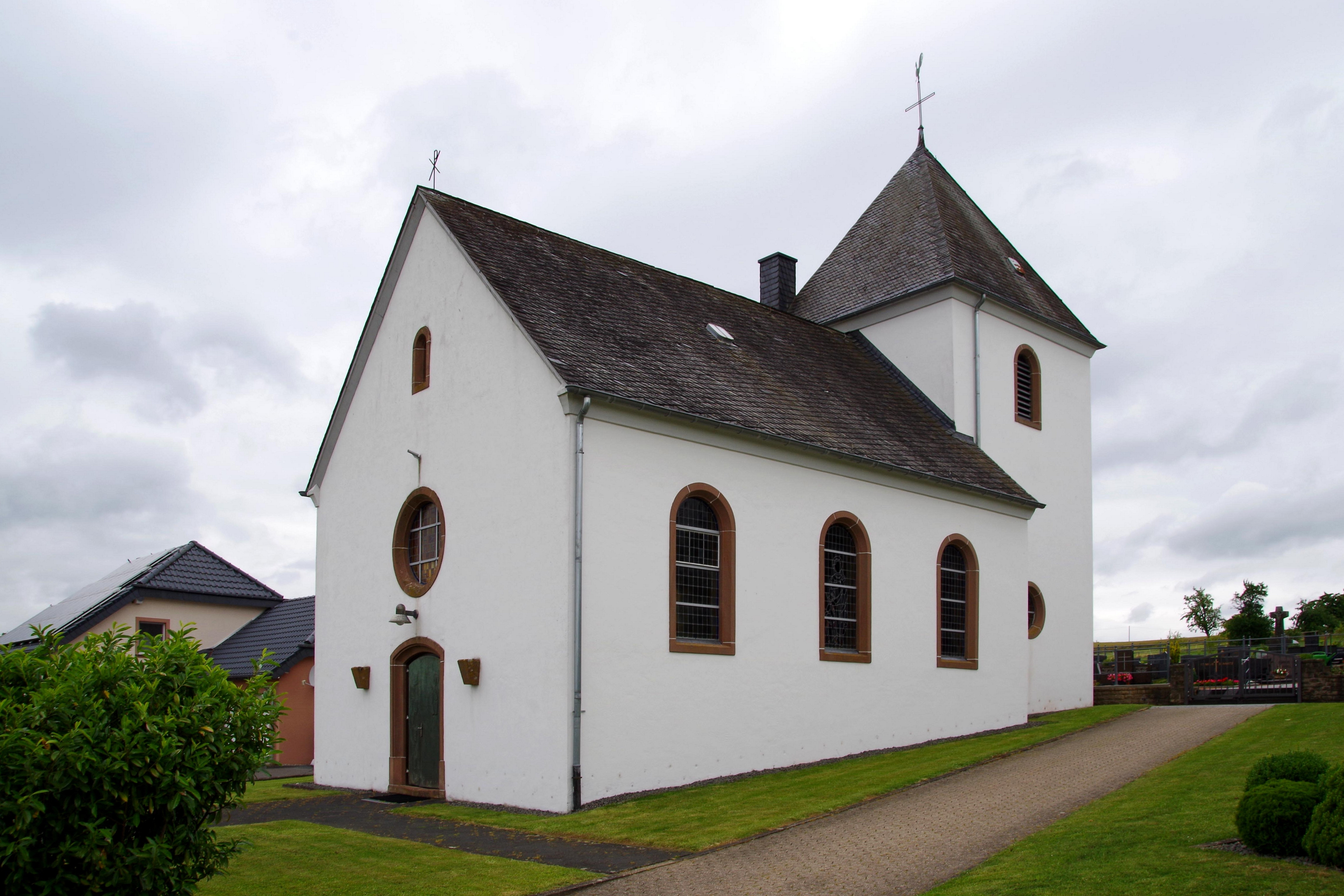 St. Hubertus (Oberweiler (Eifel)), Südostseite